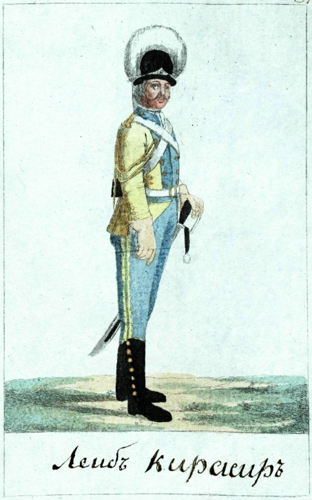 Лейб-кирасир.